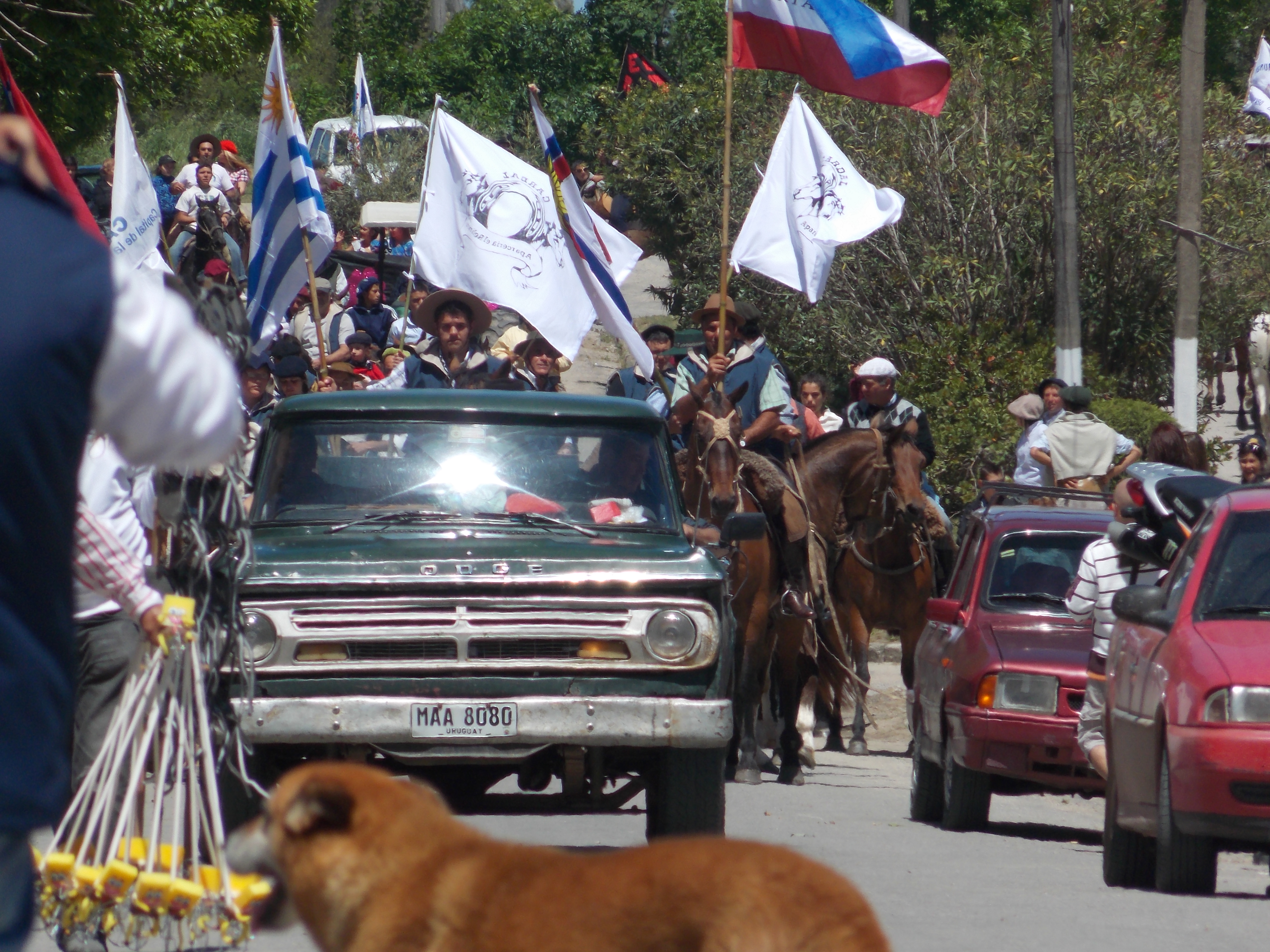 desfile popular